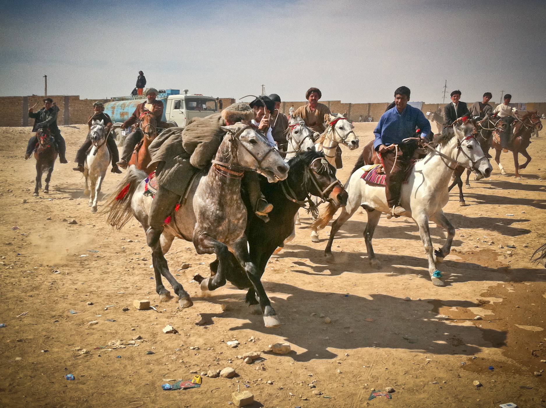 Nowruz Buzkashi Match in Mazar